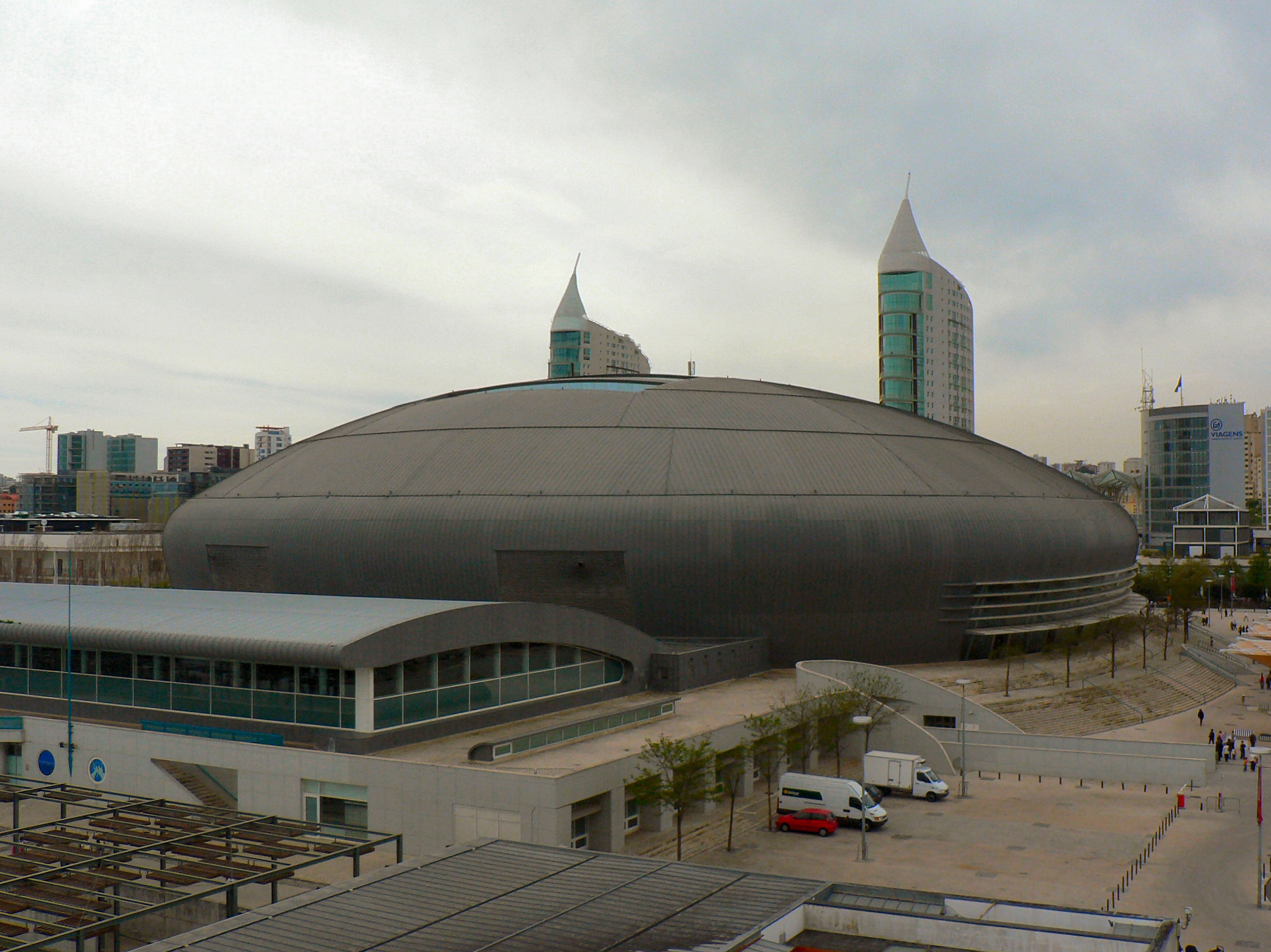 Pavilhão Atlântico no Parque das Nações em Lisboa (Vista do teleférico)